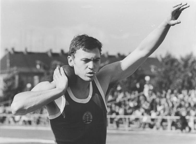 Joachim Kirst ADN-ZB Schaar 01.11.1971 Potsdam: Europameister - Volkskammerkandidat-Konzentration und Kampfgeist sind zwei Eigenschaften, die dem Sportler Joachim Kirst den Weg zur Weltspitze ebneten. Sie werden ihm auch bei seiner Künftigen Tätigkeit als Volksvertreter von Nutzen sein. Der zweifache Europameister im Zehnkampf, Offizier der NVA und Fernstudent an der DHfK, wurde von der FDJ als Kandidat für die Volkskammer der DDR aufgestellt. Eines seiner Ziele: In seiner Heimatstadt Potsdam wil er besonders den Schul- und Lehrlingssport aktivieren. (Foto von einem früheren Wettkampf)